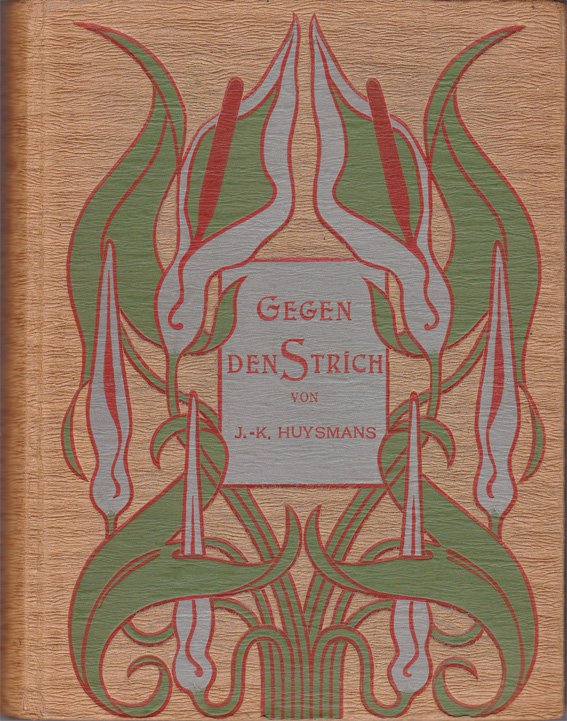 Deutsche Erstausgabe 1897